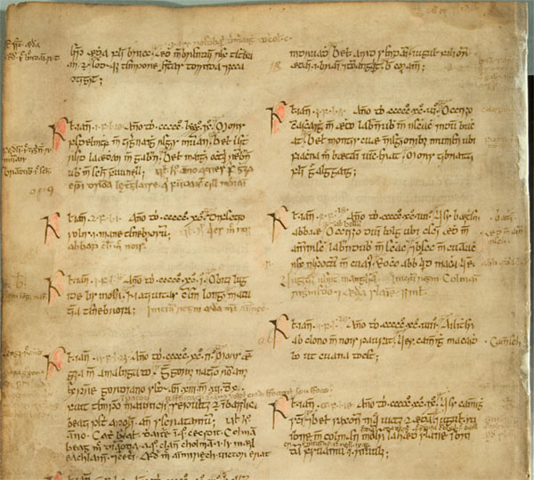 Manuscript of the Annals of Ulster 500-1000AD